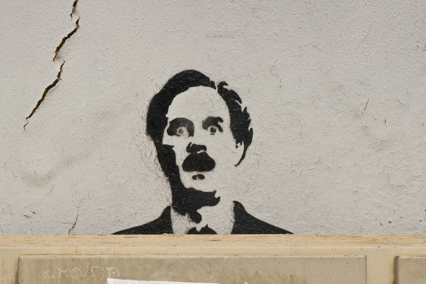 Stencils - Lisbon